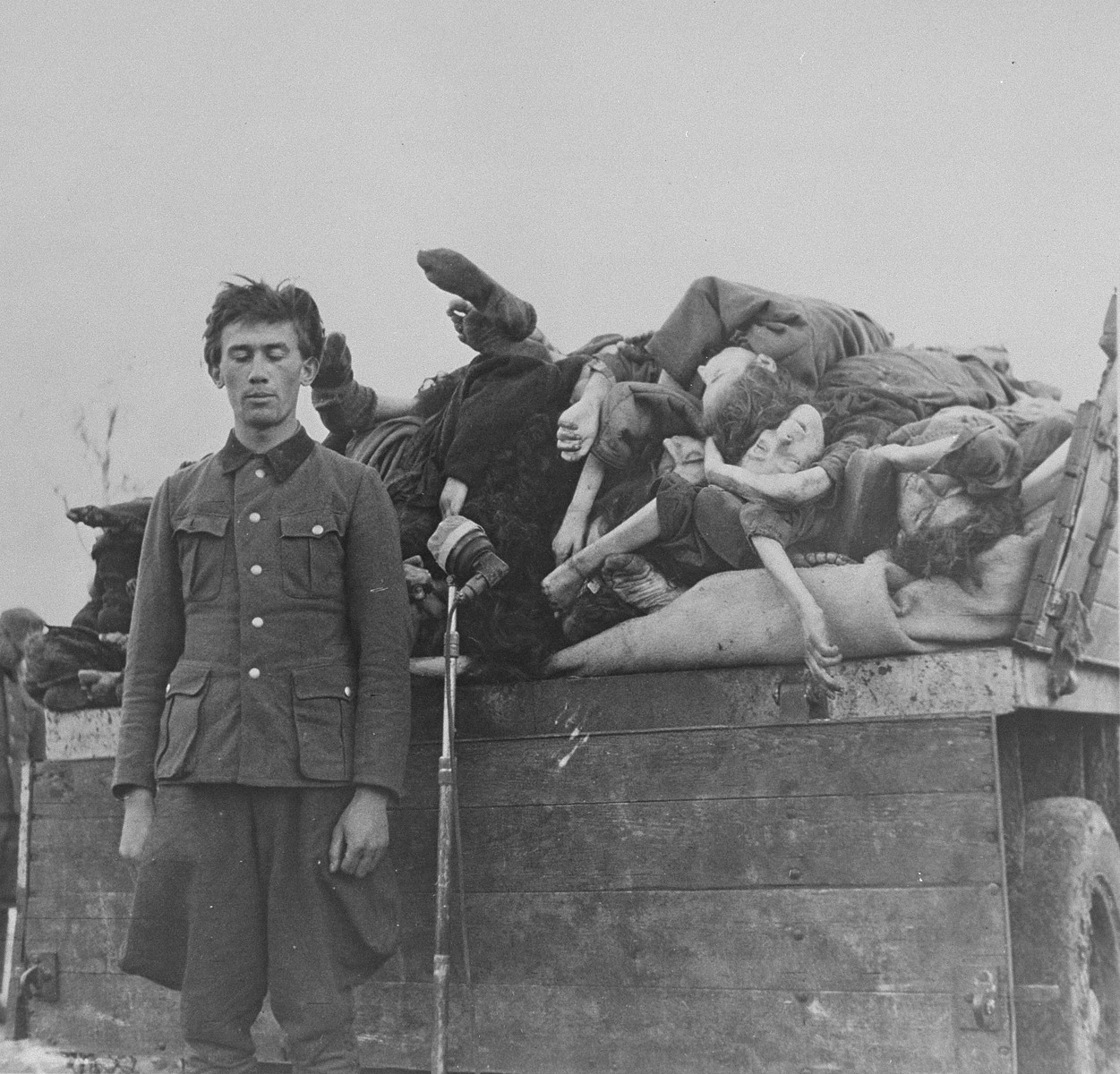 Der gefangene SS-Unterscharführer Wilhelm Dörr (9.2.1921 in Merenberg/Kreis Oberlahn - 13.12.1945 in Hameln) steht vor einem Mikrophon, hinter ihm ein mit Leichen verstorbener Häftlinge beladener Lastwagen-Anhänger. Dörr war Rapportführer im Konzentrationslager Bergen-Belsen sowie stellvertretender Lagerführer im Außenlager Kleinbodungen des KZ Mittelbau-Dora; am 17.11.1945 zum Tode verurteilt und am 13.12.1945 im Zuchthaus Hameln hingerichtet.